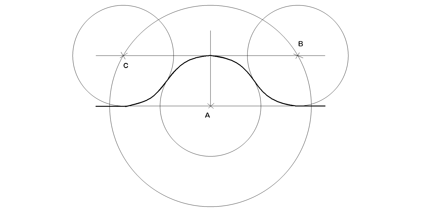 etape1